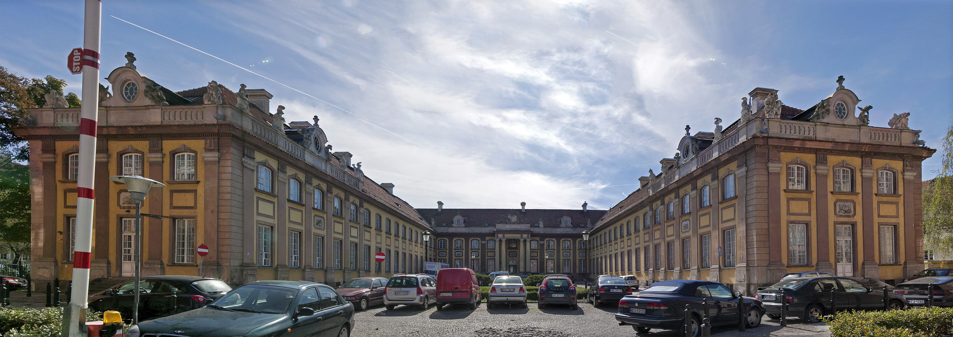 zespół pałacu Branickichoficyna, 1805, po 1945 ul. Podwale 3/Miodowa 6, Warszawa, dz. Śródmieście 07.1965.